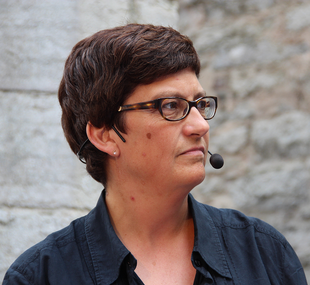 Journalisten och prästen Helle Klein under Almedalsveckan 2013.